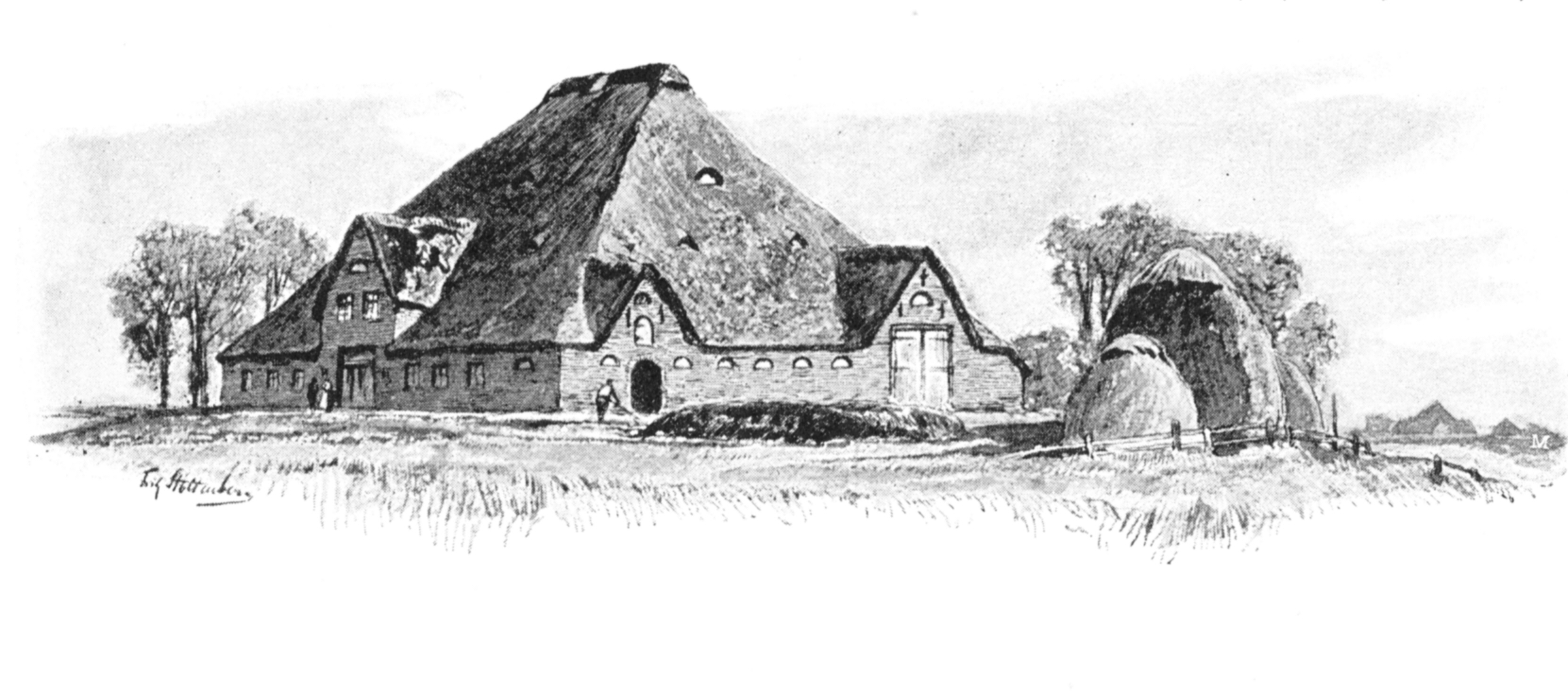 Eiderstedter Hauberg (Bauernhaus), Zeichnung von Fritz Stoltenberg